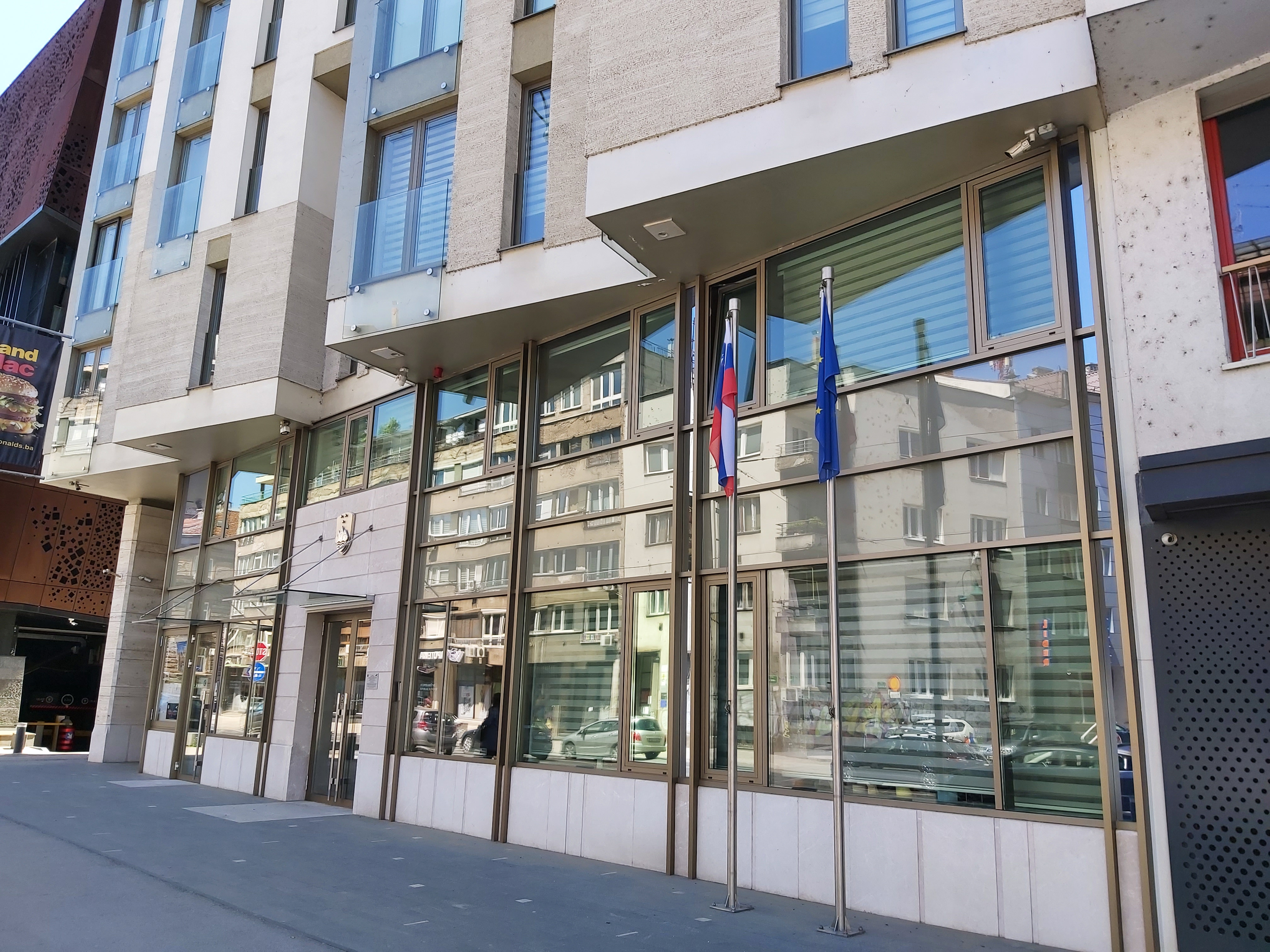 Veleposlaništvo Republike Slovenije Sarajevo